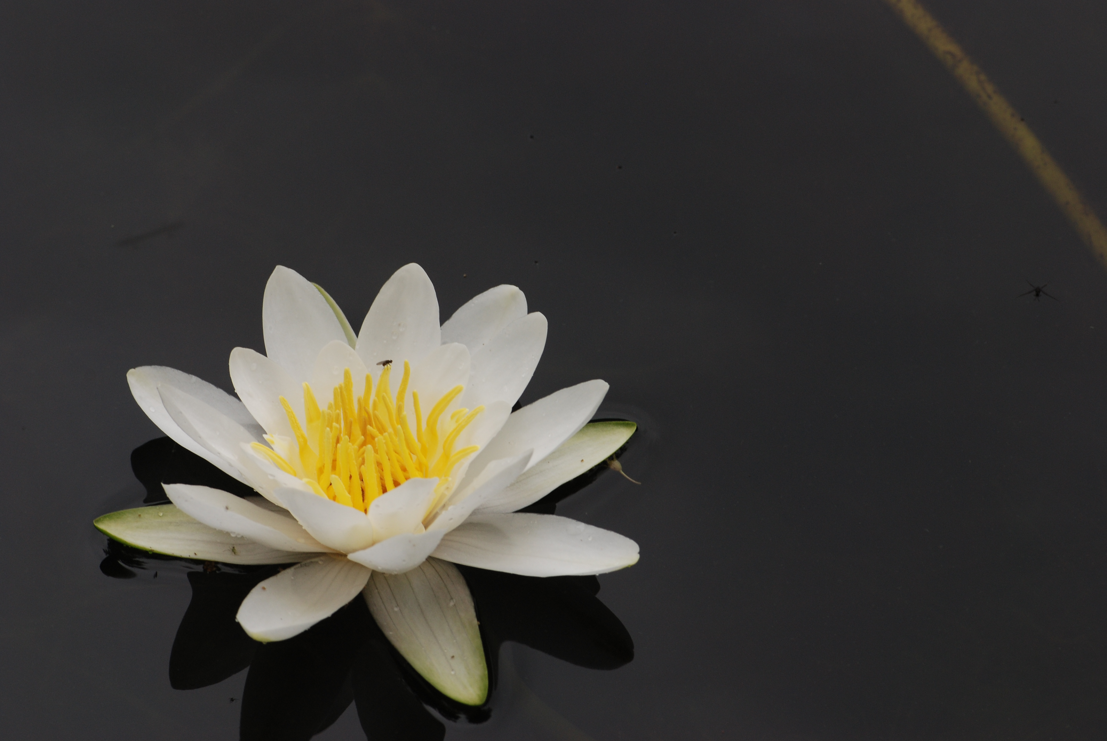 Nymphea alba Pré à Pion à Longpré-les-Corps-Saints (Somme), France